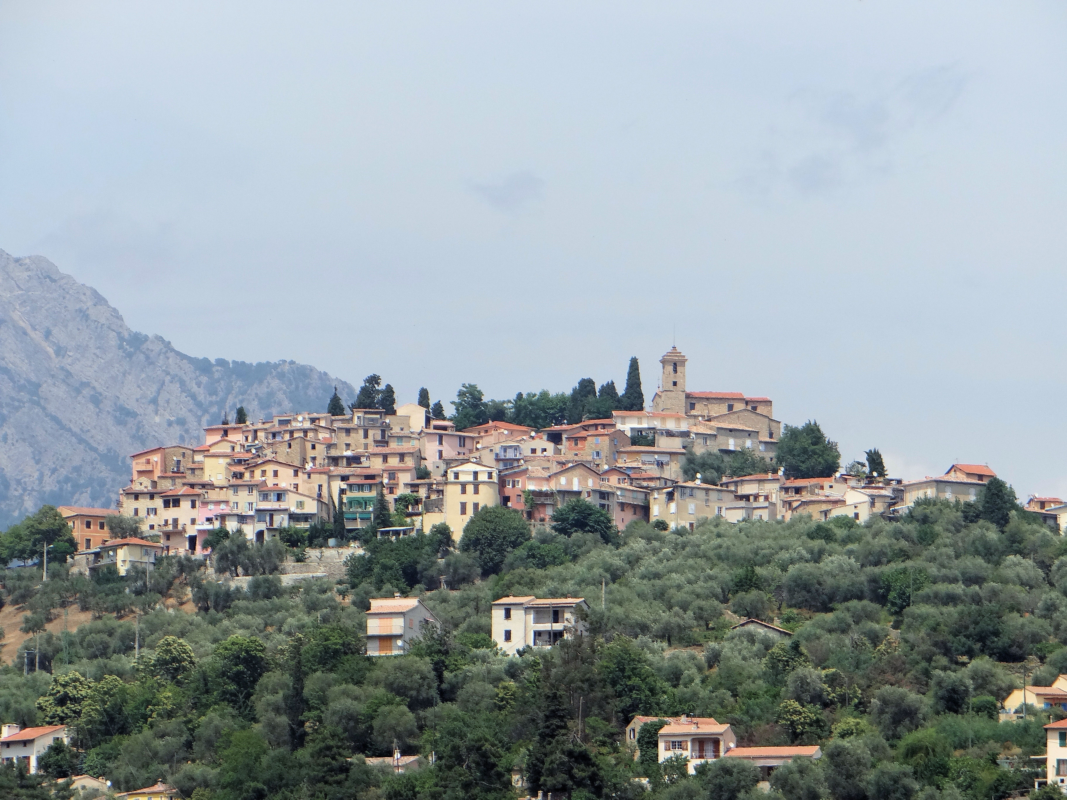 Coaraze - Vue d'ensemble du village